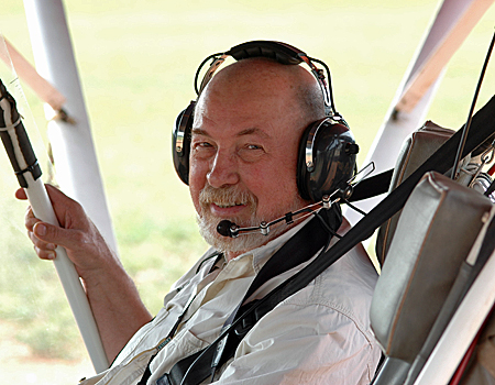 Clément MATHIEU lors d'une mission en Guyane 01